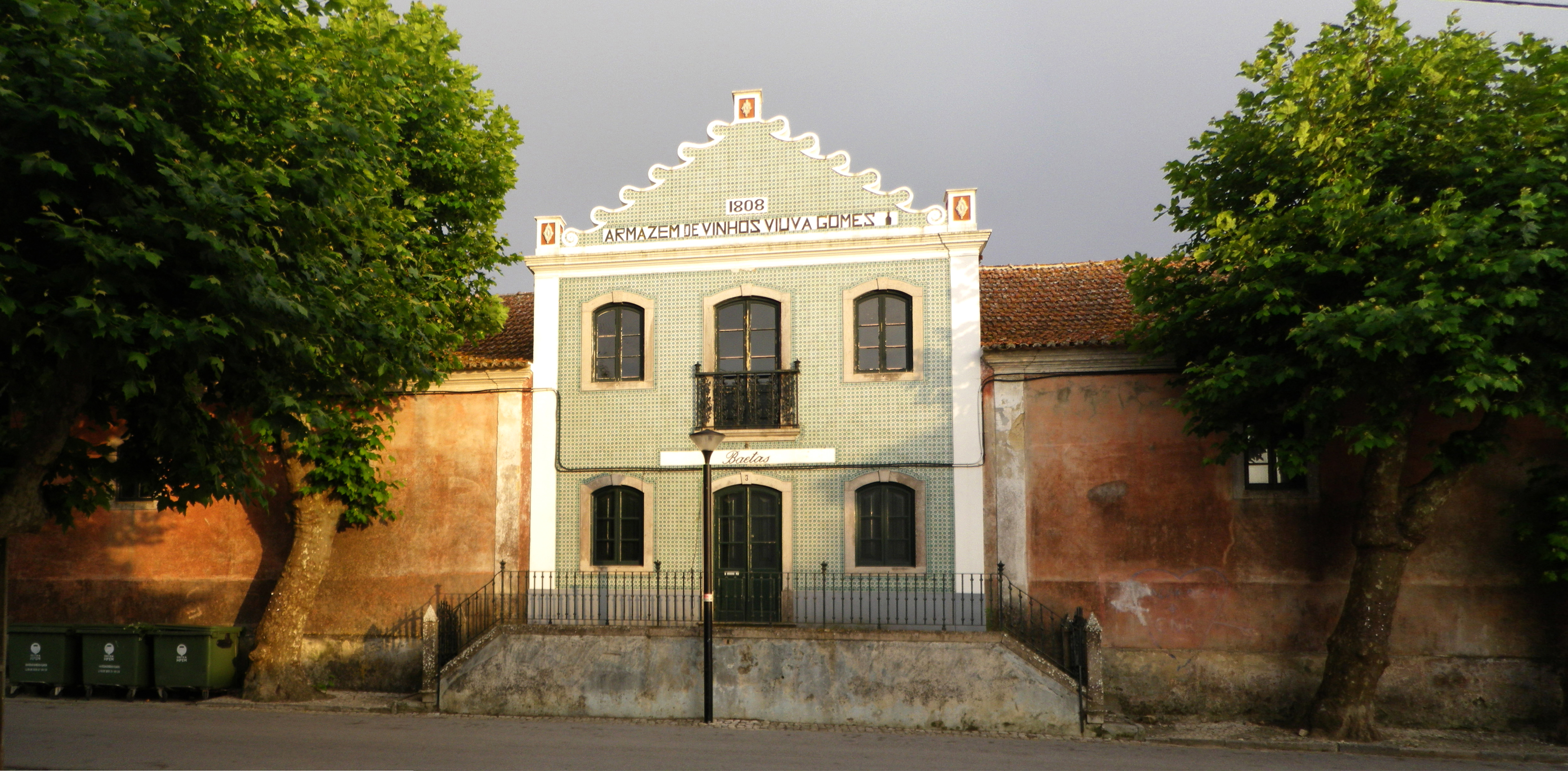 Armazem de Vinhos - Weinlager in Colares Portugal